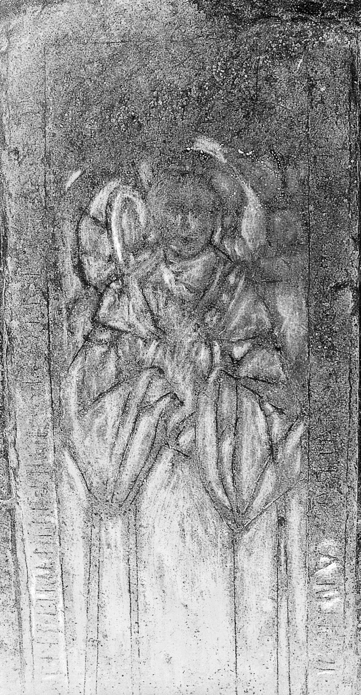 Pierre tombale de Guillaume de Joyeuse décédé en 1540 , évêque d'Alet en l'église de Joyeuse 07260